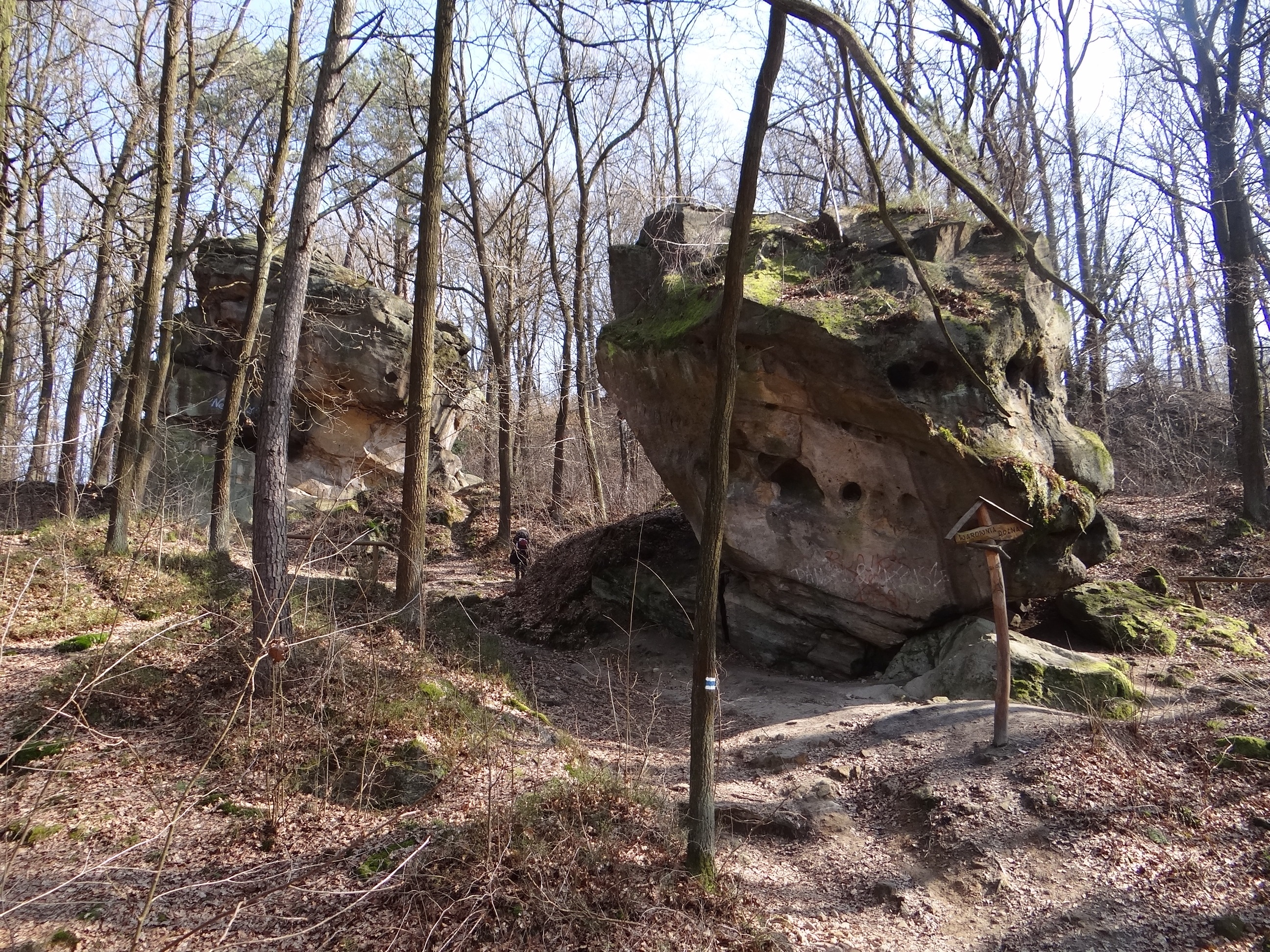 "Warownia Górna i Warownia Dolna" w Rezerwat przyrody Skamieniałe Miasto w Ciężkowicach